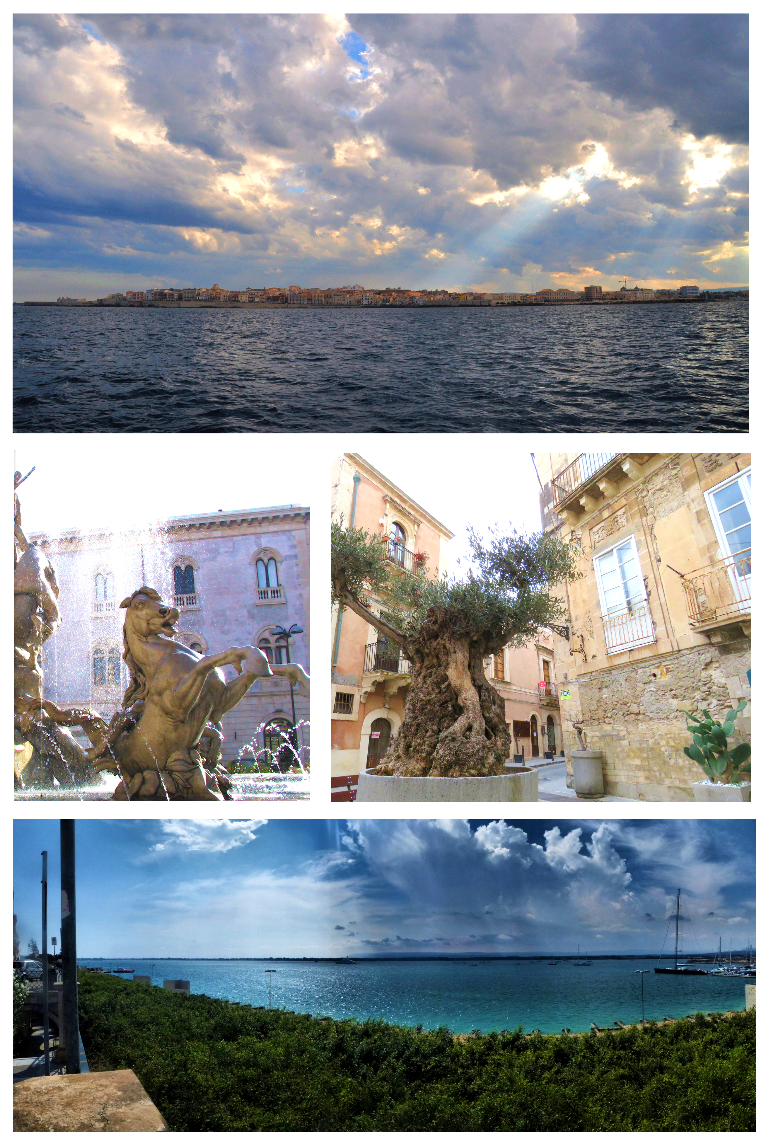 Collage su Ortigia composto con immagini tutte già presenti su Wikimedia Commons nella categoria: Syracuse.